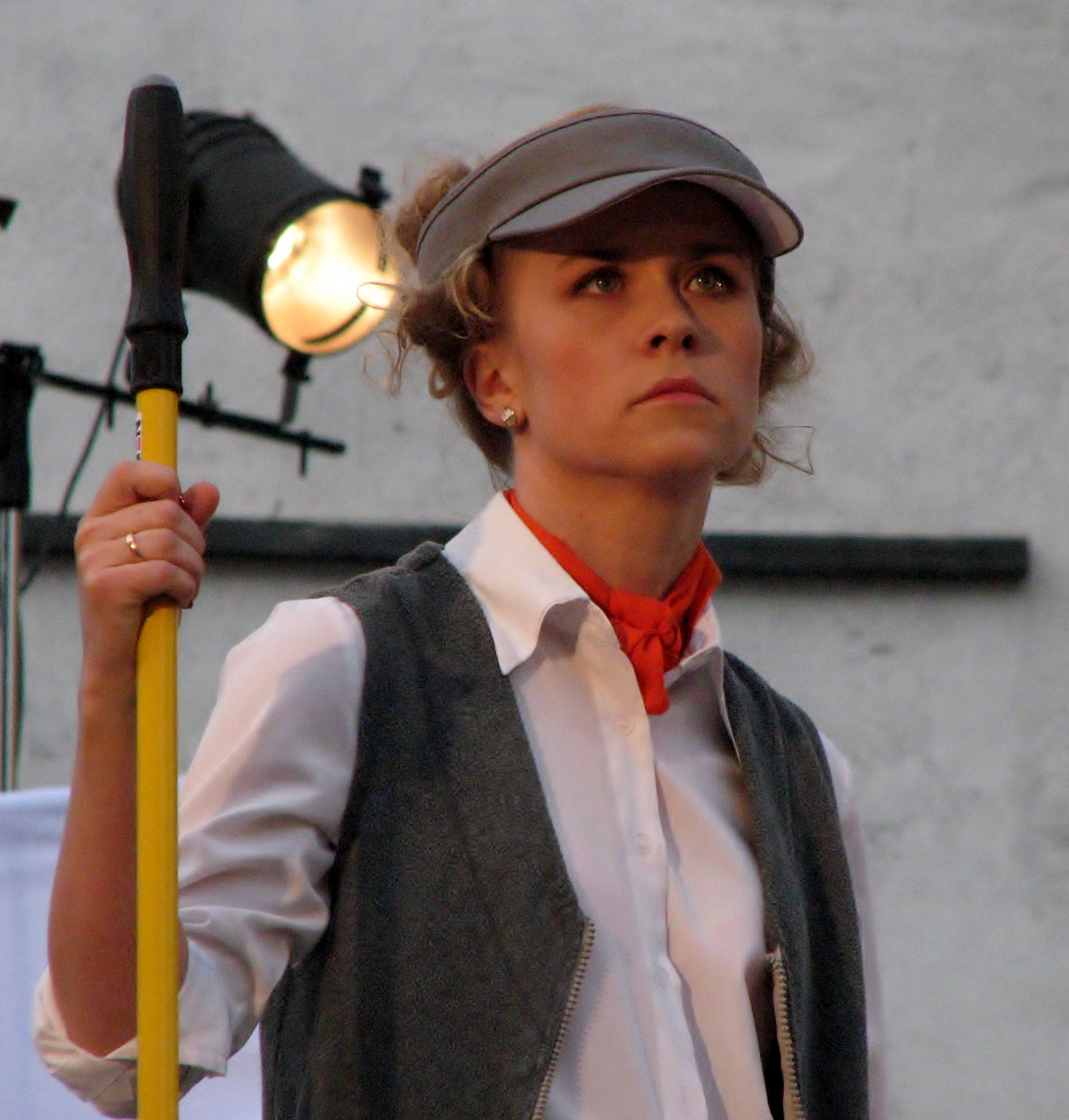 Evelin Võigemast Tallinna Linnateatri 48. hooaja avamisel